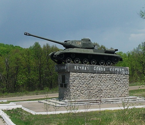 Тяжёлый танк ИС-2 (памятник погибшим односельчанам в селе Новопокровка Красноармейского района Приморского края).